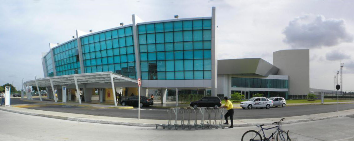 Presidente Castro Pinto International Airport